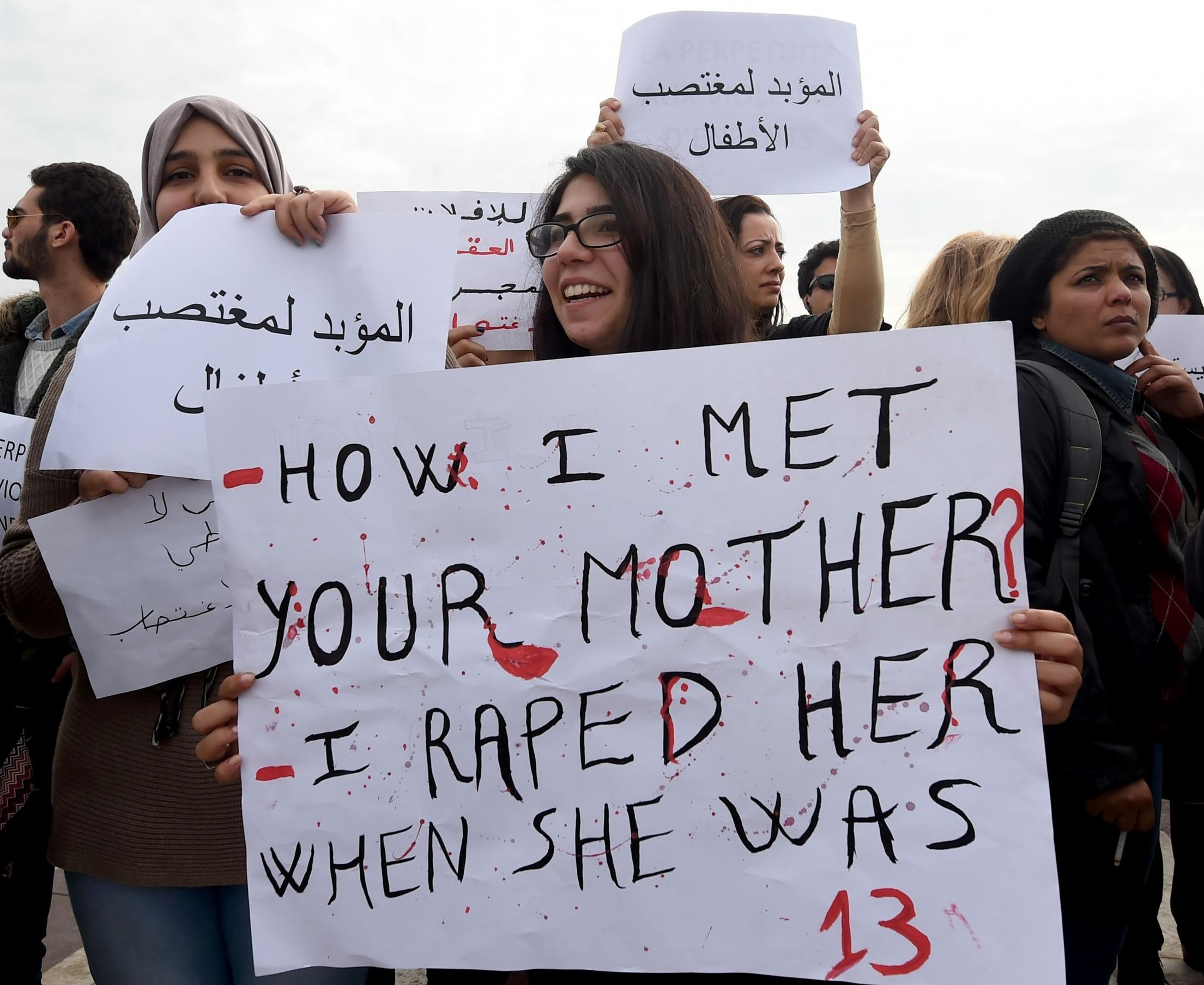 כפיית נשים